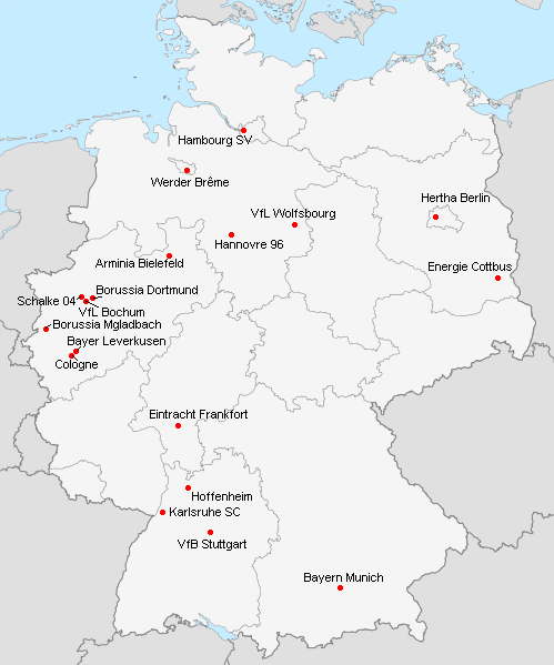 Liste des clubs participant à la bundesliga 1 en 2008-2009